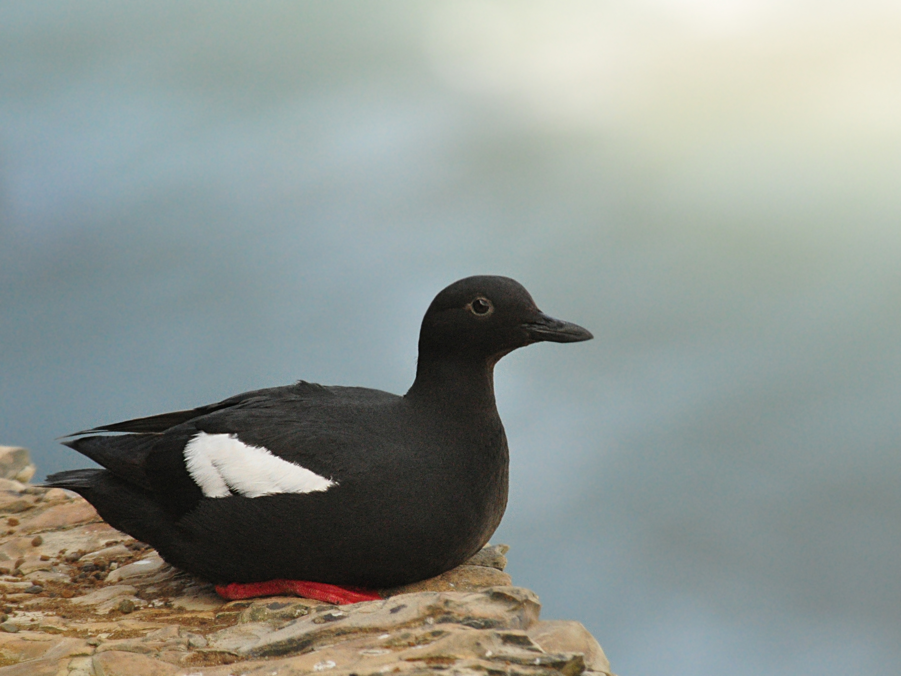 Cepphus columba